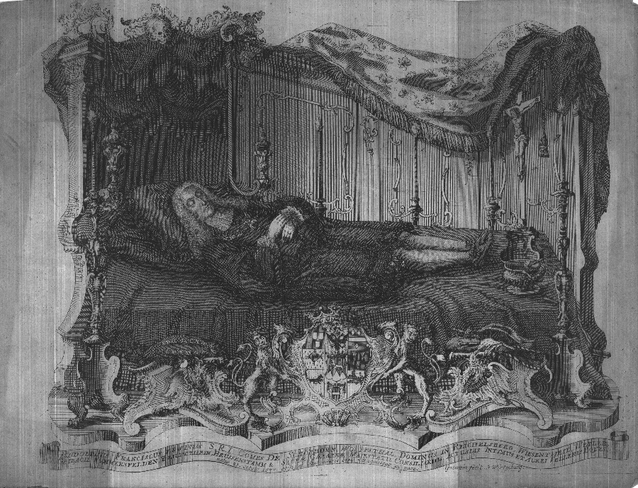 Rudolf Franz Erwein von Schönborn (1677-1754). Signatur: Port 3743 GR